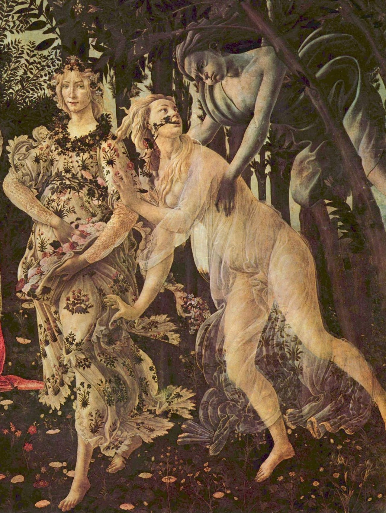 excerto do quadro Alegoria da Primavera, de Sandro Botticelli, retratando a cena na qual Zéfiro agarra Clóris e esta se transforma em Flora.